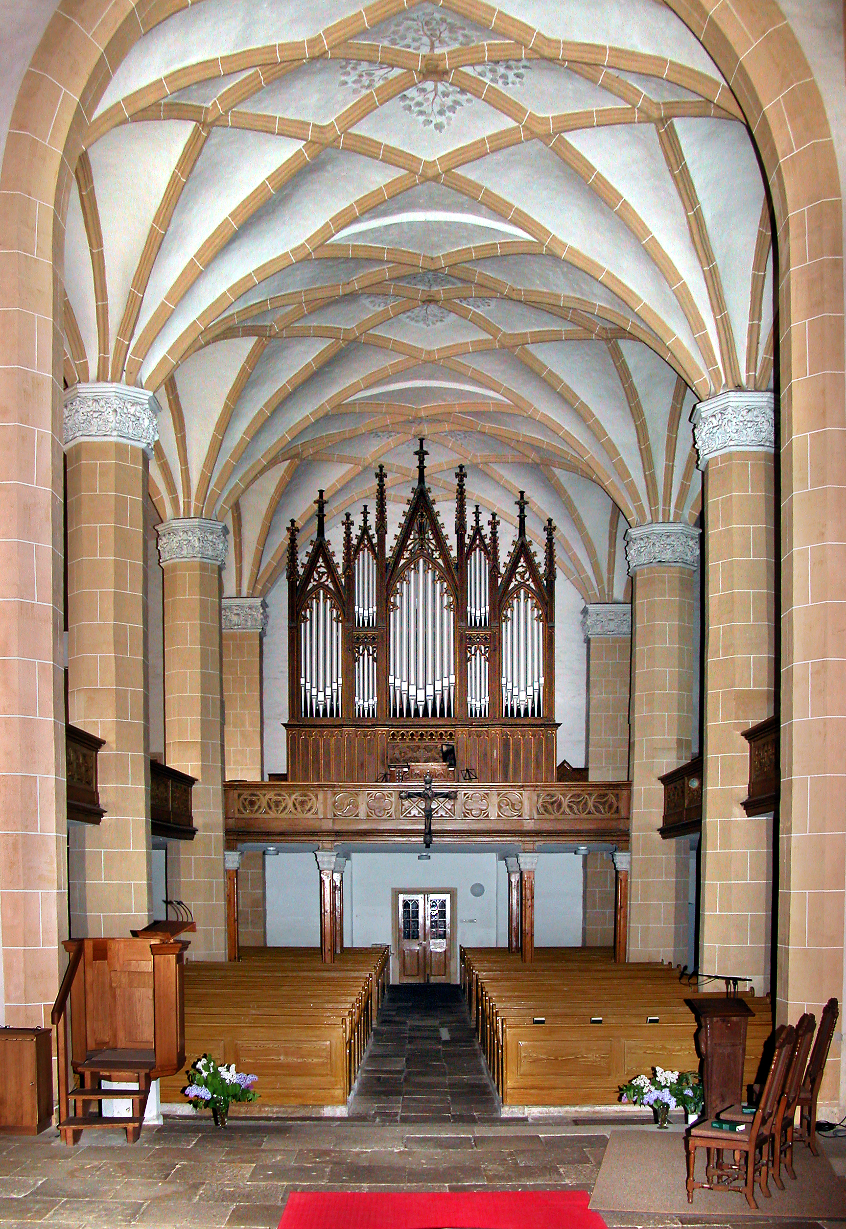 03.05.2009 04774 Dahlen (Sachsen), Kirchstraße (GMP: 51.364957,13.000966): Stadtkirche Unserer Lieben Frauen. Spätgotische Hallenkirche. Die Orgel auf der Westempore wurde 1865/66 von Carl Eduard Jehmlich in Dresden gebaut. [DSCN37114+37124.TIF]20090503215MDR.JPG(c)Blobelt